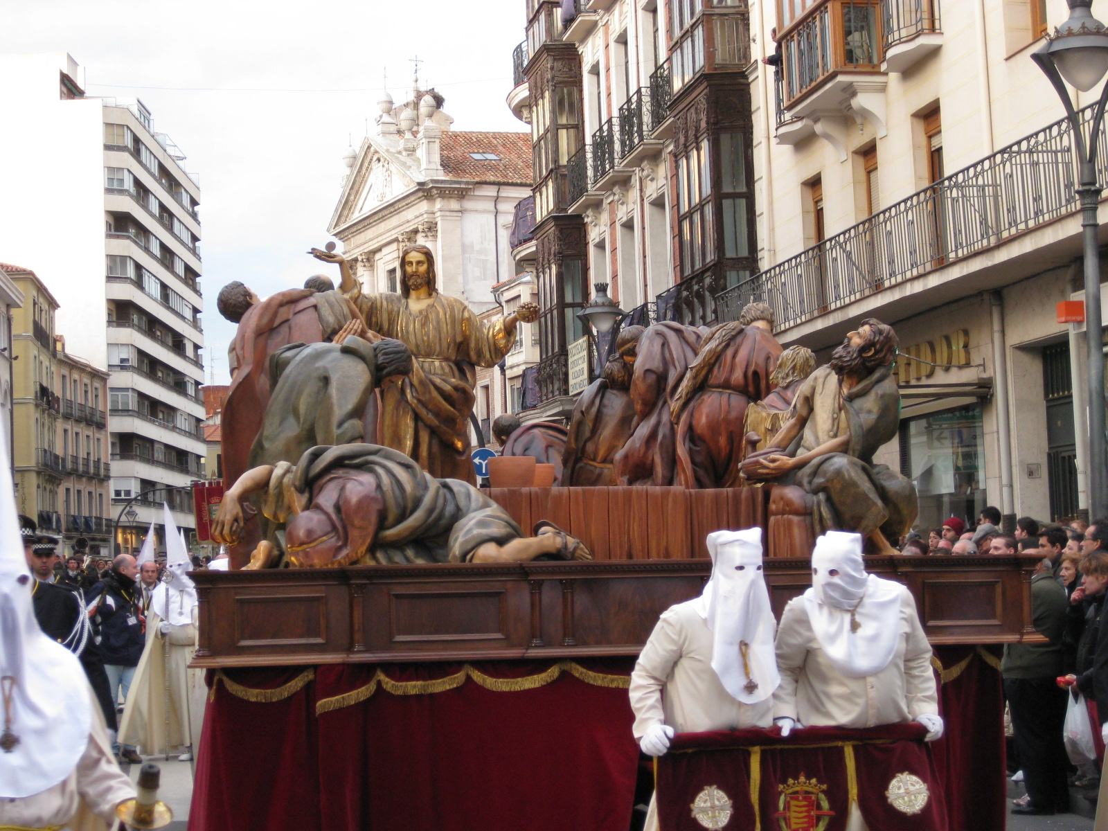 Paso de la Sagrada Cena. Cofradía Penitencial y Sacramental de la Sagrada Cena, Valladolid (España).